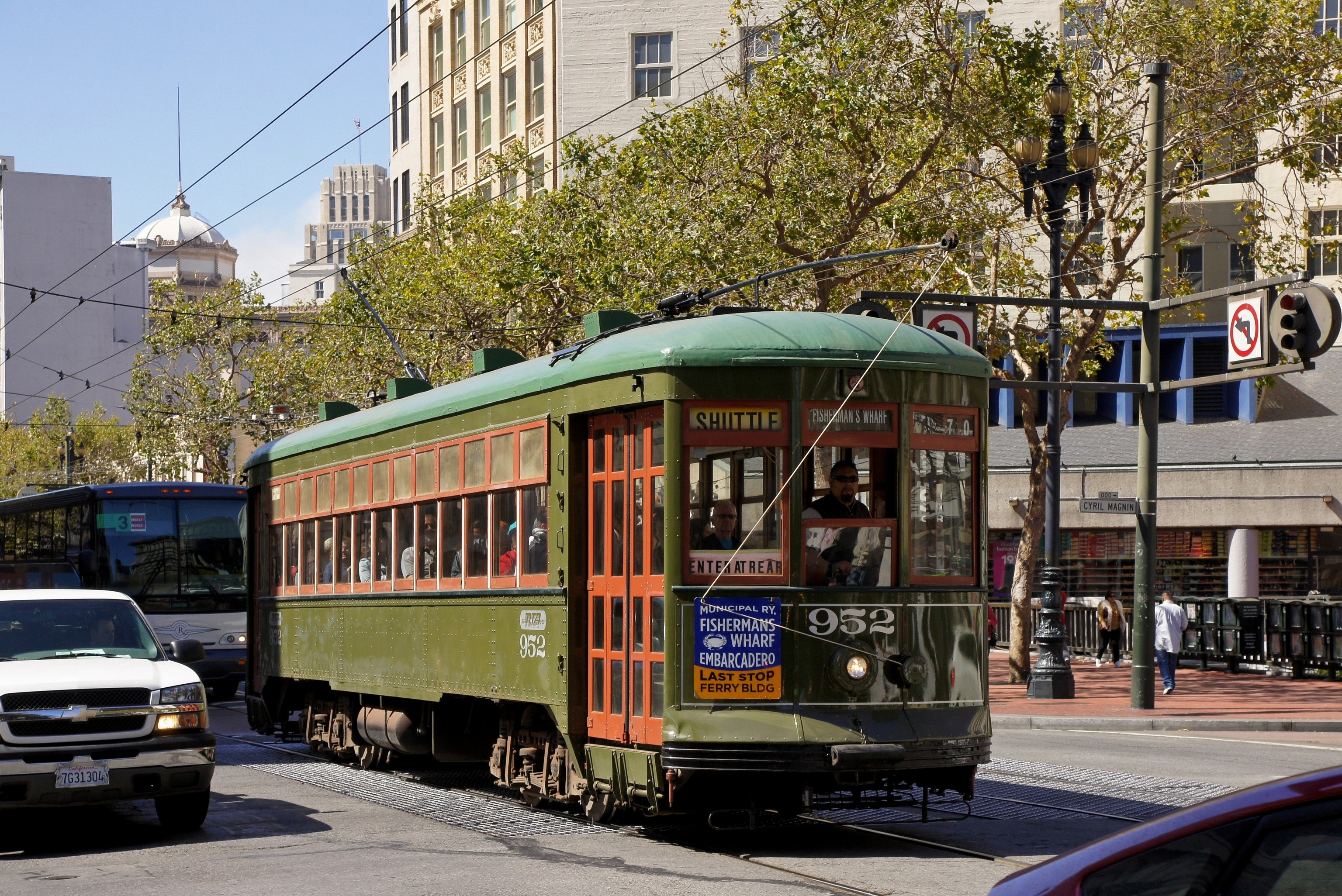 Moyen de transport en commun de San Francisco (USA). A former New Orleans streetcar.